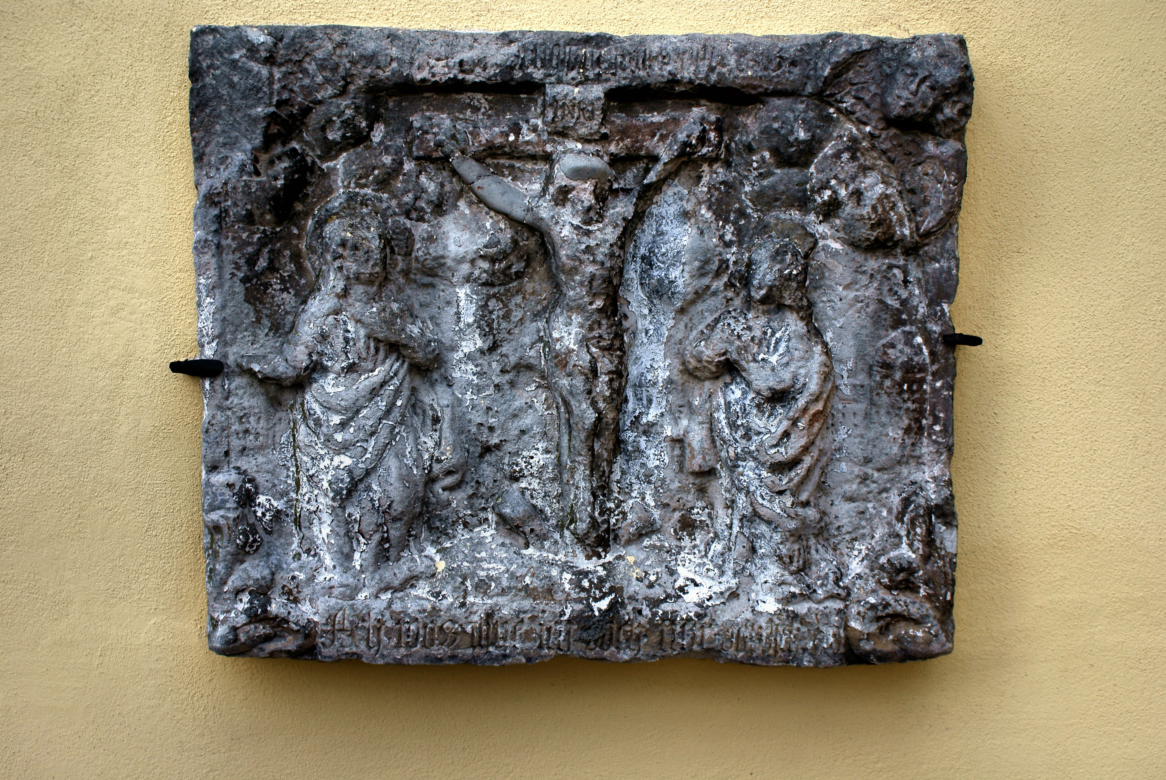 Grębocice - kościół parafialny św. Marcina (zabytek nr rejestr. A/1629/122)